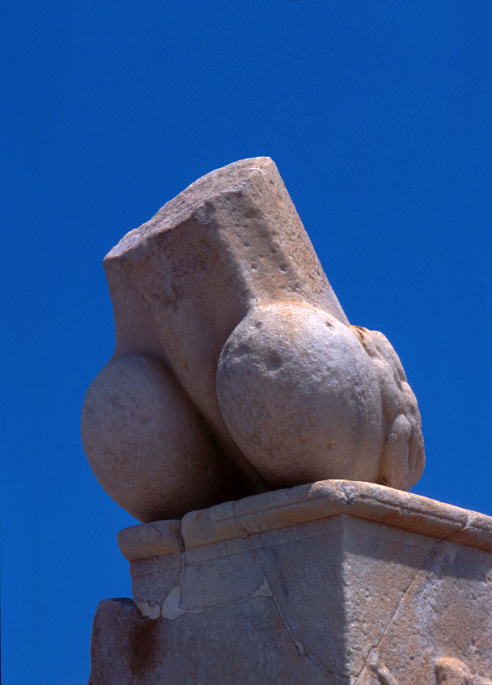 Description : Phallus monumental - marbre - Ile de Delos Cette stèle ithyphallique fait partie d'une série, en alignement à l'entrée d'un temple (?) dans l'ile de Delos. Toutes ont été vandalisées. Auteur : --DS 17 oct 2004 à 01:53 (CEST) Licence